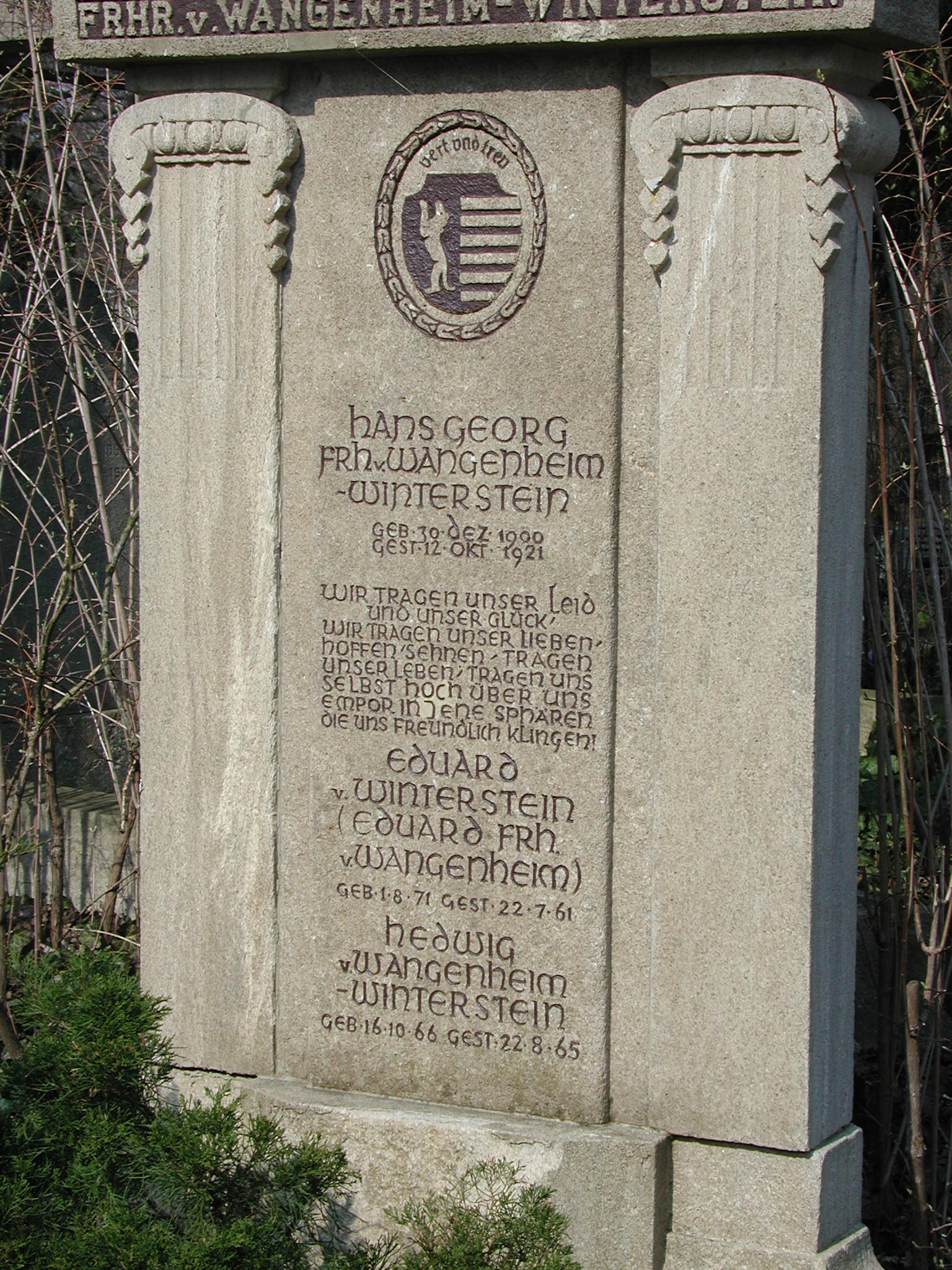 Die Familiengrabstätte derer von Wangenheim/Winterstein in Berlin-Friedrichsfelde